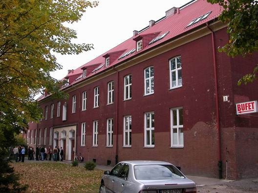 Szczecin. Dawne koszary KBW. Obecnie budynek Wydz. Prawa i Administracji US.